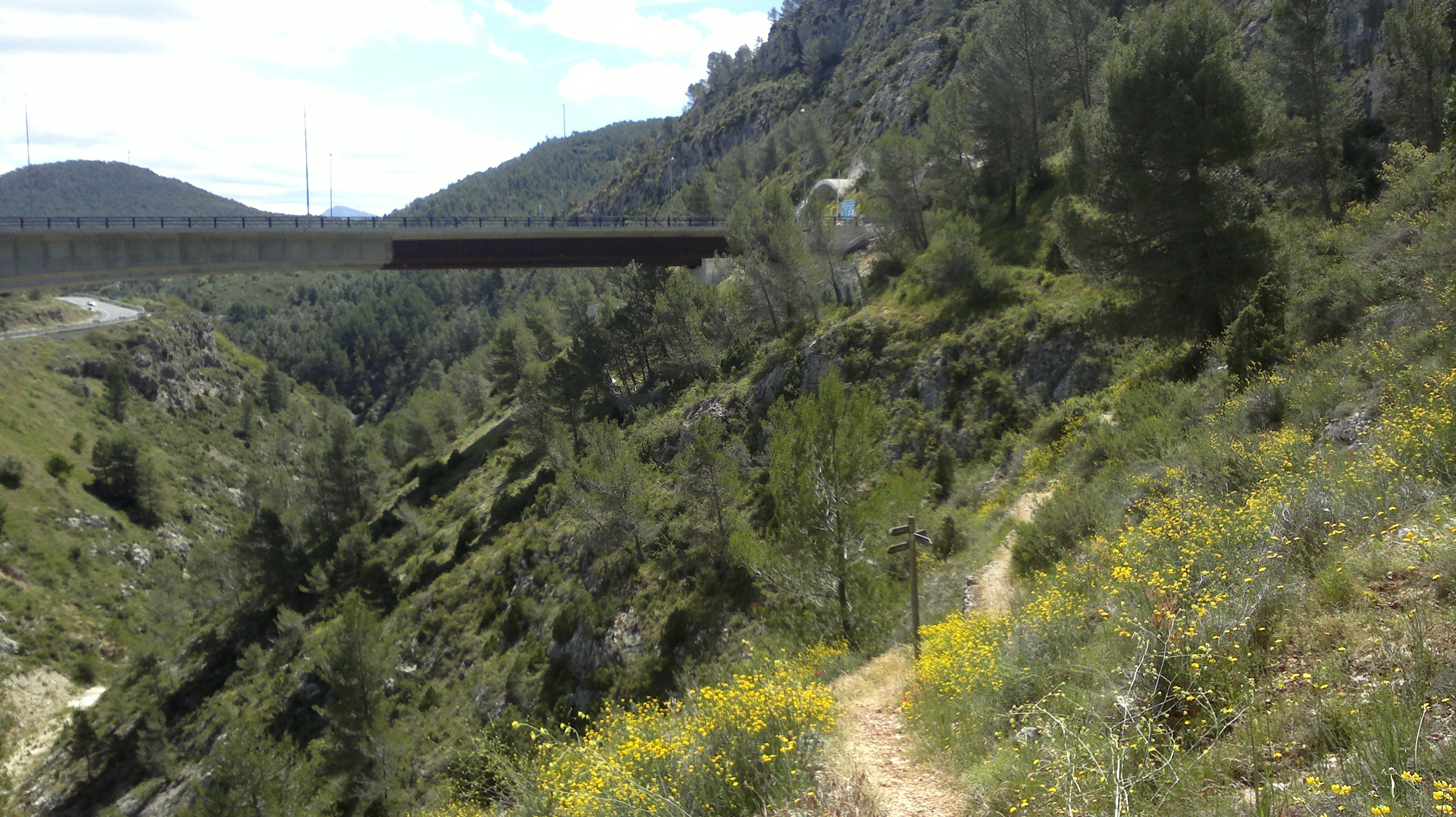 Anem cap al pont